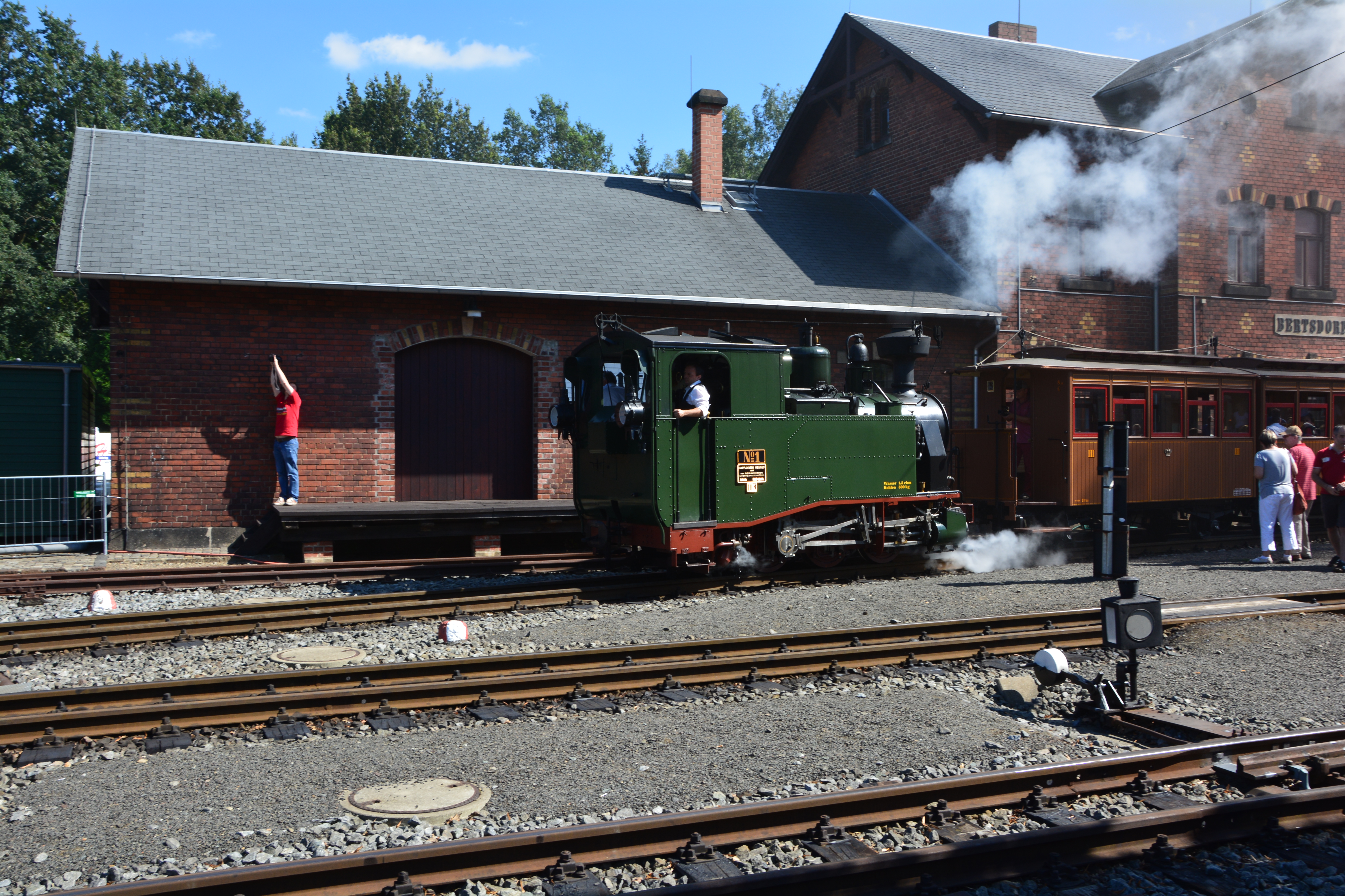 Zittauer Schmalspurbahn, 10 Jahre Historik Mobil am 07. August 2016, Bahnhof Bertsdorf. Ausfahrt Dampflok I K Lok Nr. 54